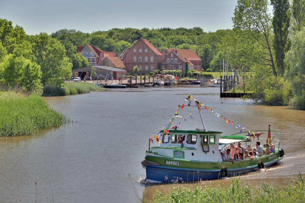 Historischer Hafen in Neuhaus (Oste) an der Aue, kurz vor ihrer Mündung in die Oste, mit dem Schiff „Bärbel“.